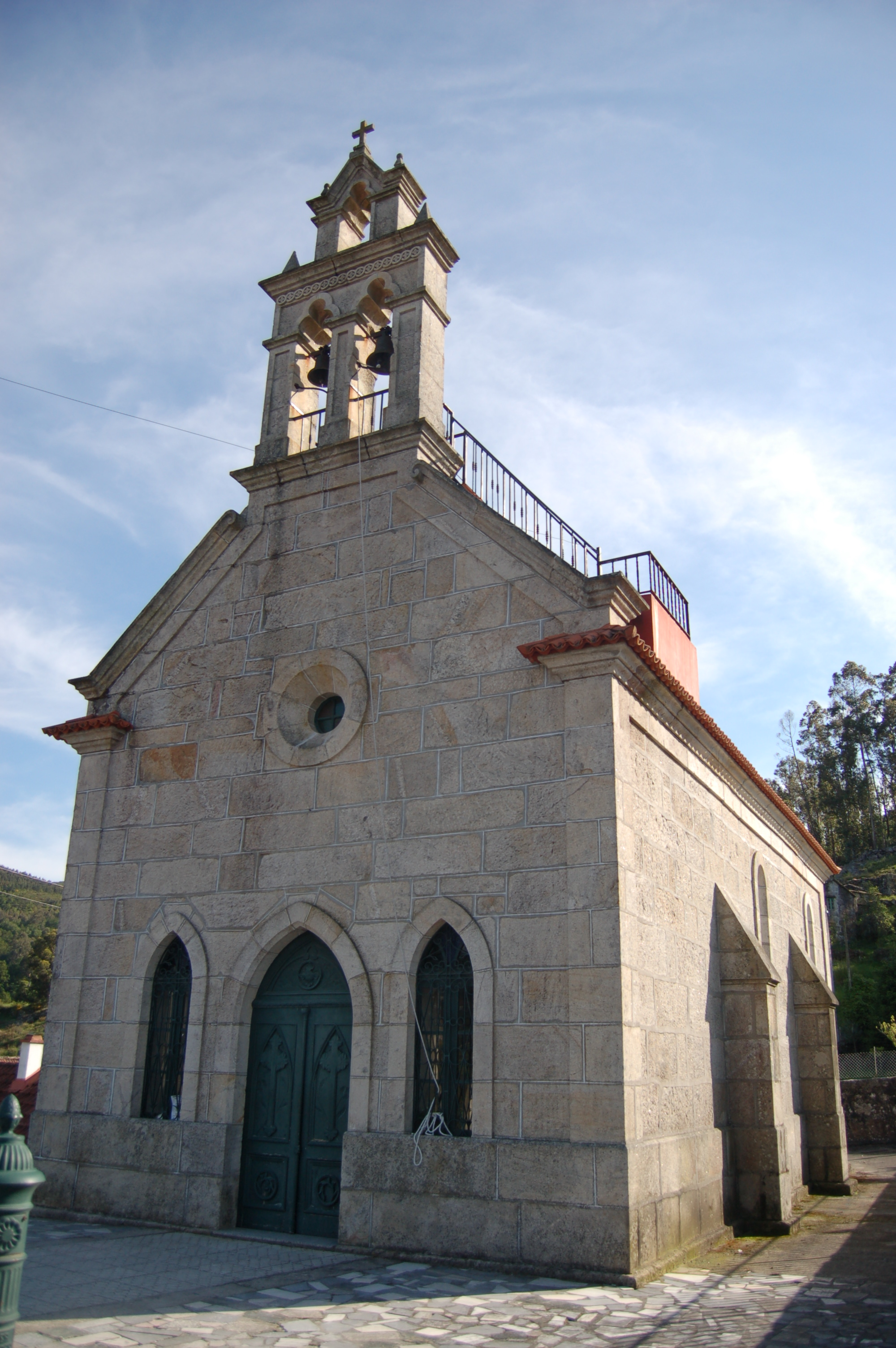 Igrexa parroquial de San Miguel de Ventín (Fornelos de Montes)